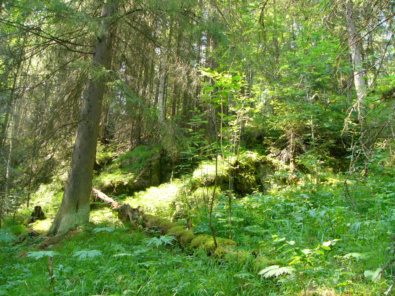 Растительный покров, находящийся вдоль тропы в парке «Оленьи Ручьи». фотогрфия сдалена мной в парке Оленьи Ручьи